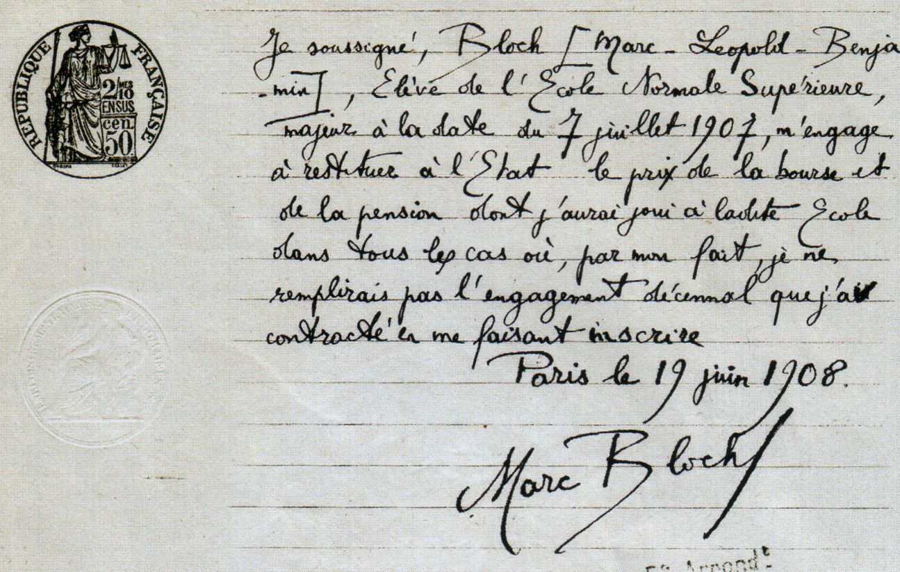 Engagement de servir l'État pendant 10 ans signé par Marc Bloch à son entrée à l'École normale supérieure.